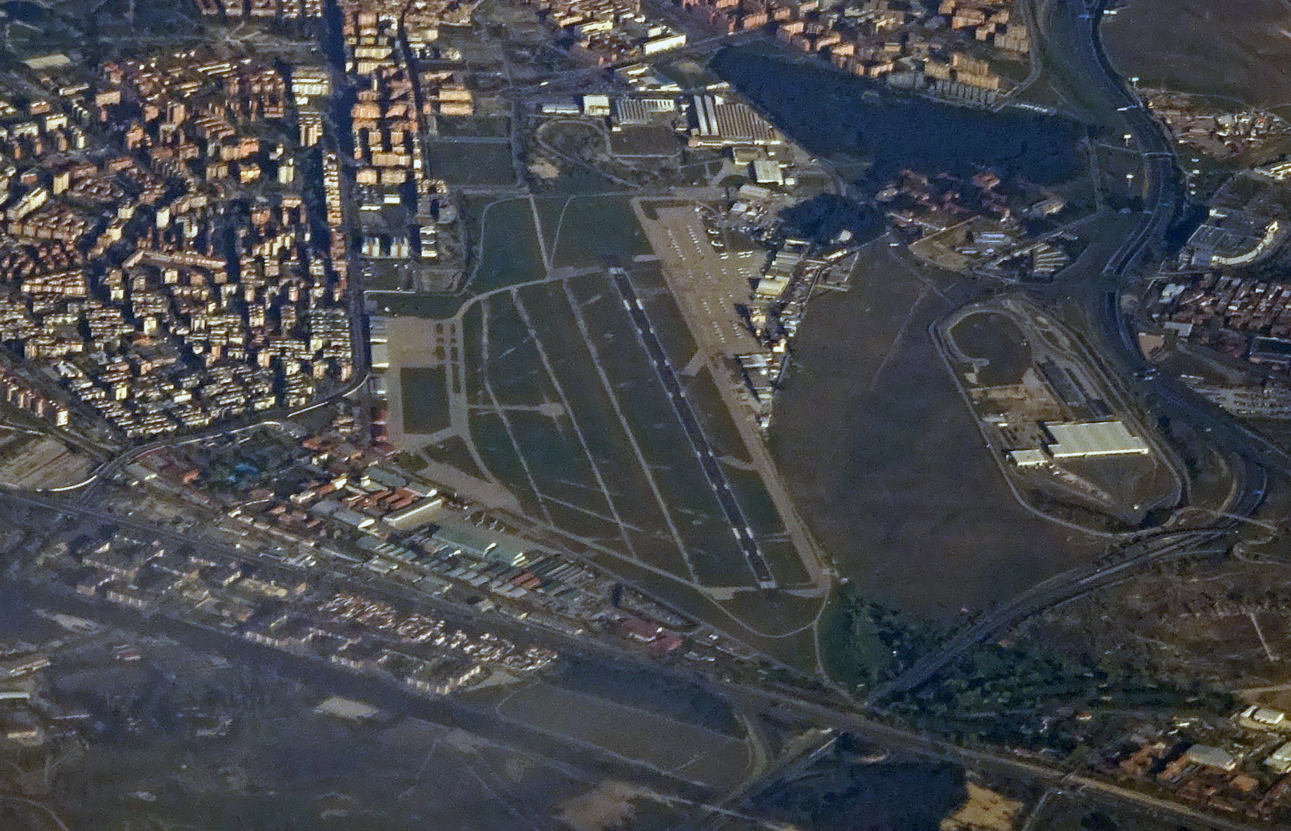 ECV AIRPORT CUATRO VIENTOS